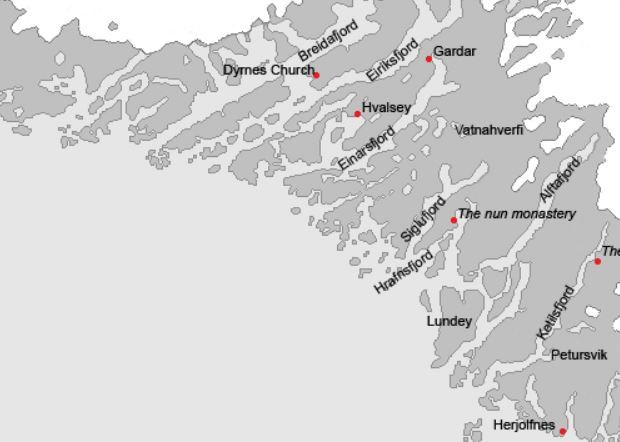 Position de Vatnahverfi dans l'établissement de l'Est.